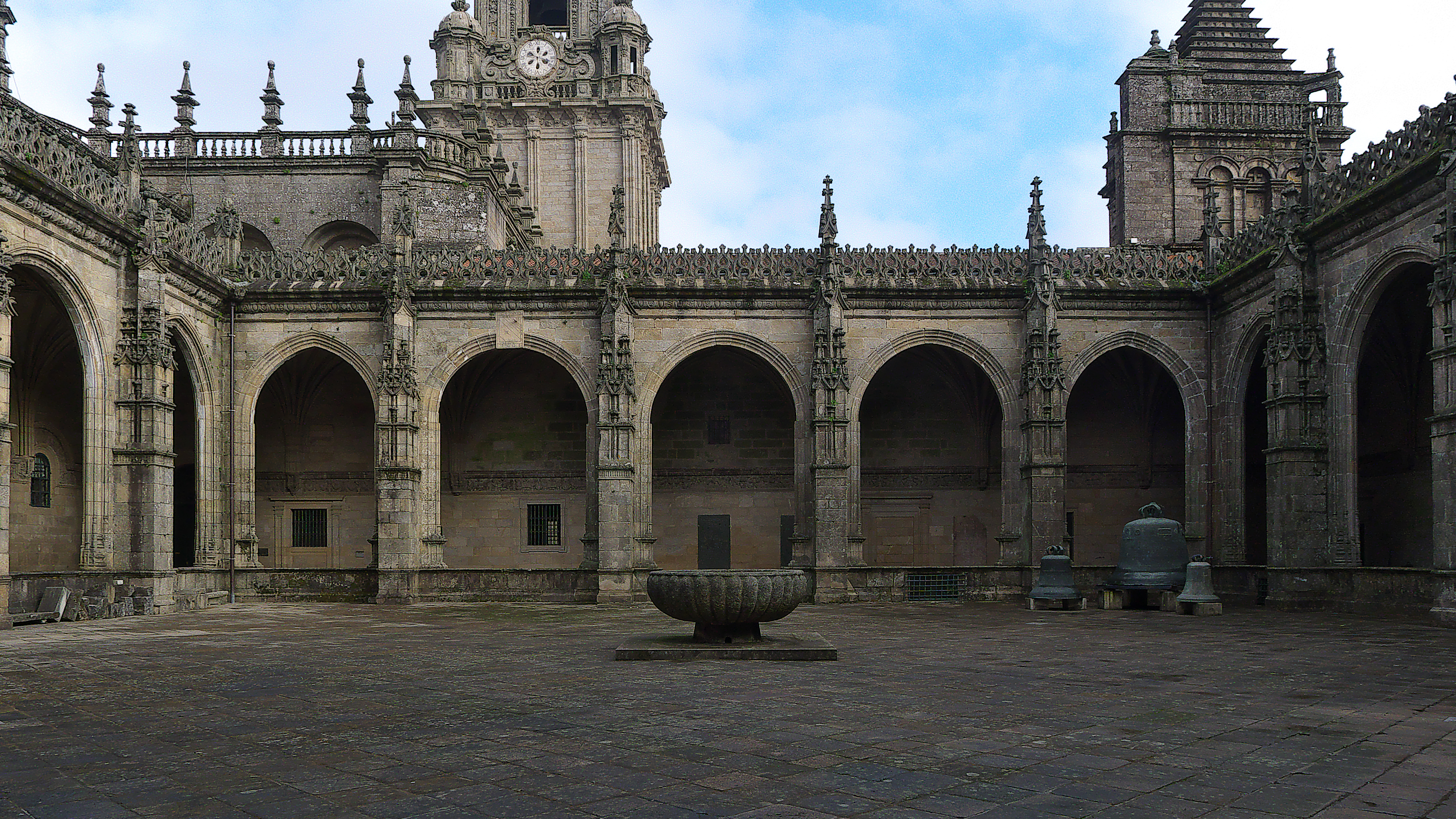 Galería oriental del claustro plateresco.